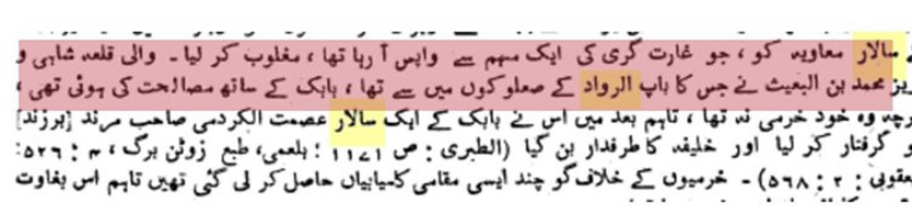 وثيقة بالغة الفارسية مختصرها ان الرواديين فرع من بني سالار